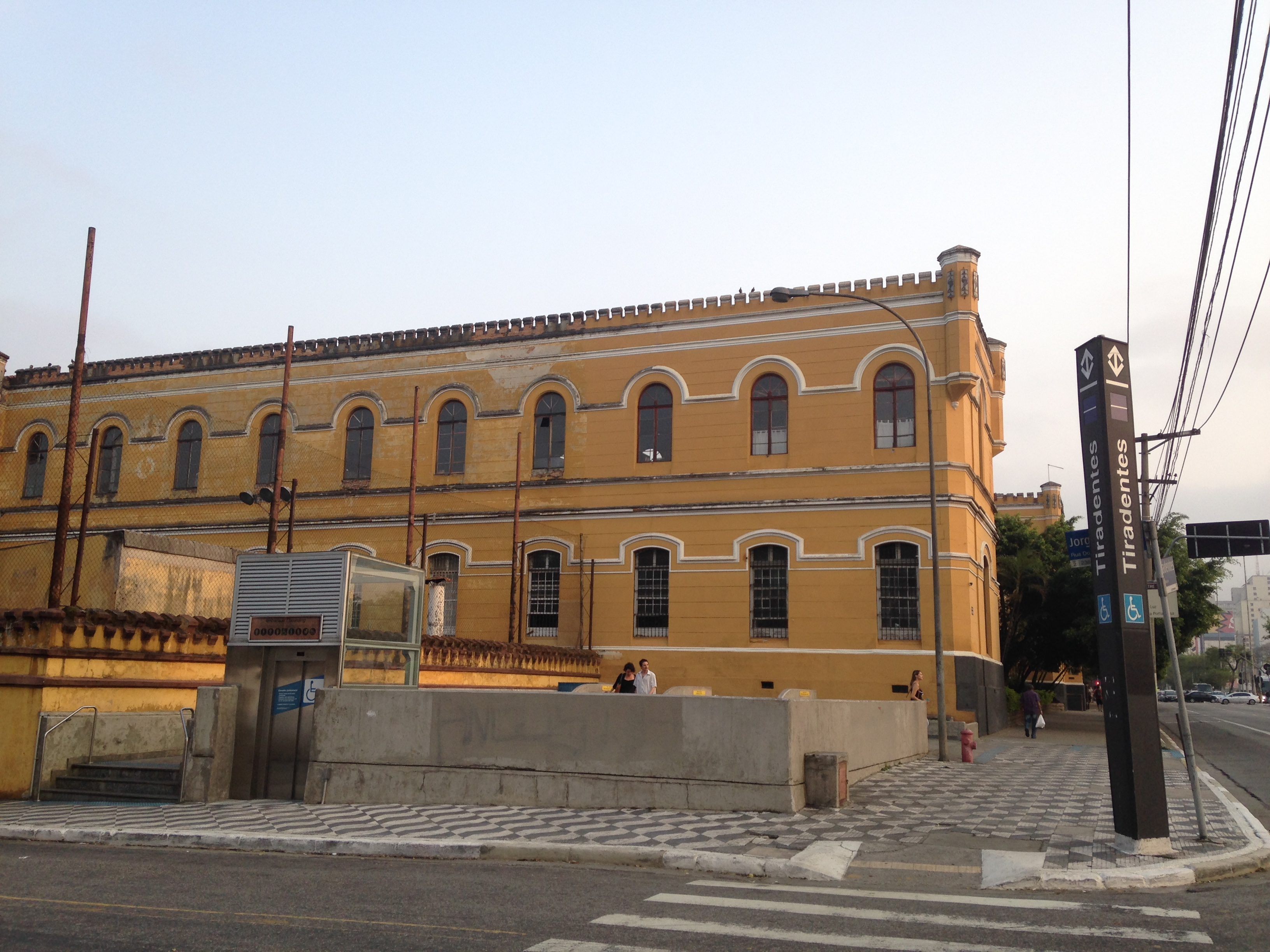 Lateral do Quartel da Rota. O local é perto da estação Tiradentes, linha azul do metrô. (Av. Tiradentes, 440 - Luz, São Paulo)